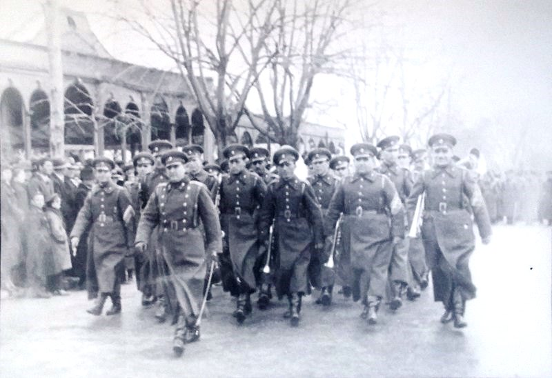 Снимка на военния оркестър на 8-ми Приморски полк. Капелмайстор: Първан Николов. Фелдфебел на командата: Драгомир Костов.